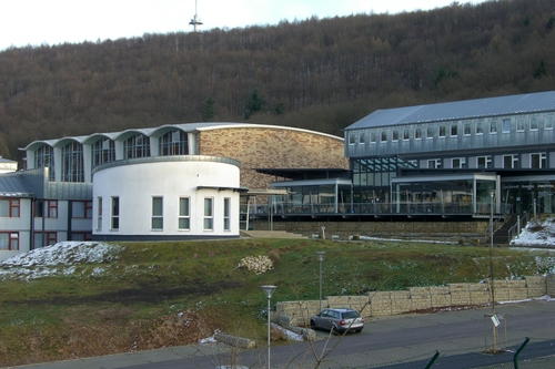 Landessportverband für das Saarland